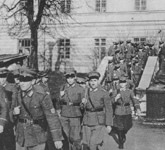 Pripadniki policijskega varnostnega zbora